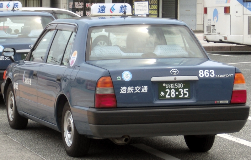 遠鉄交通のコンフォート